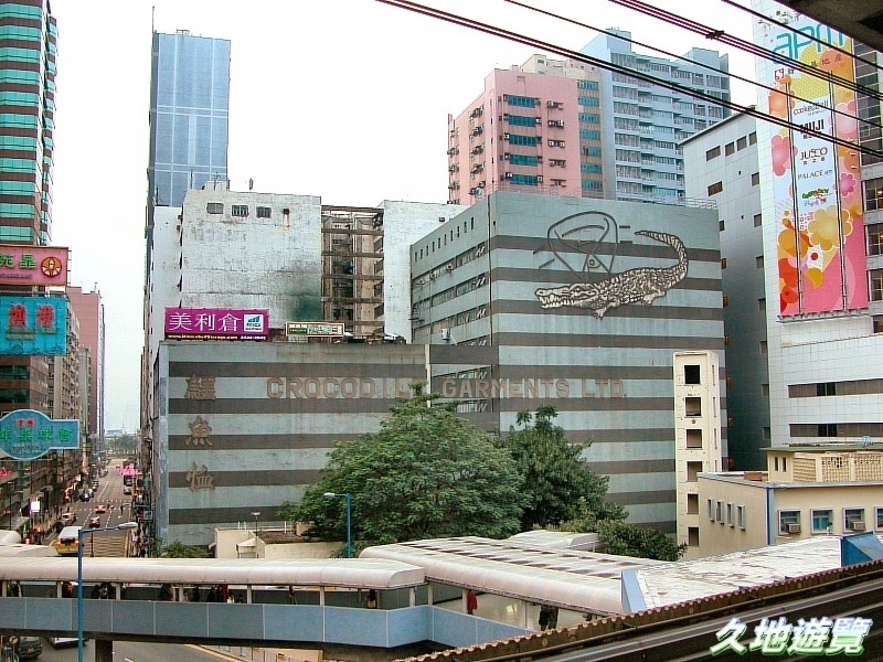 Crocodile